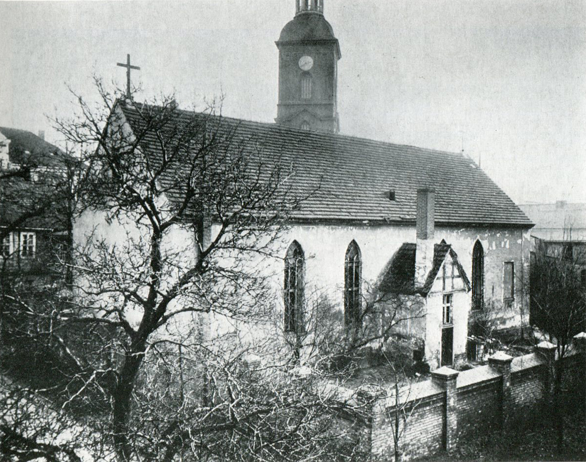 Johanneskirche (Berlin-Spandau), Ansicht von Westen. Im Hintergrund ist der Turm der Sankt-Nikolai-Kirche zu sehen